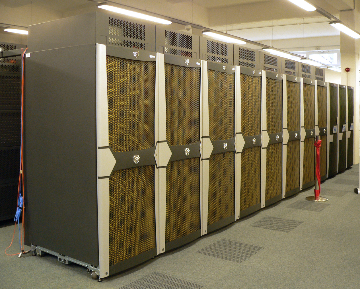 HLRN II Rechner bei einer Pressekonferenz zur Inbetriebnahme des Supercomputers HLRN-III in der Leibniz Universität Hannover